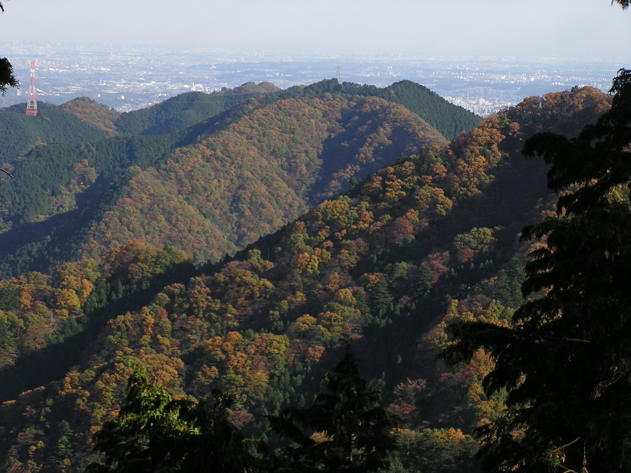 奥多摩、臼杵山グミ尾根より望む、刈寄山（緑色の山頂）